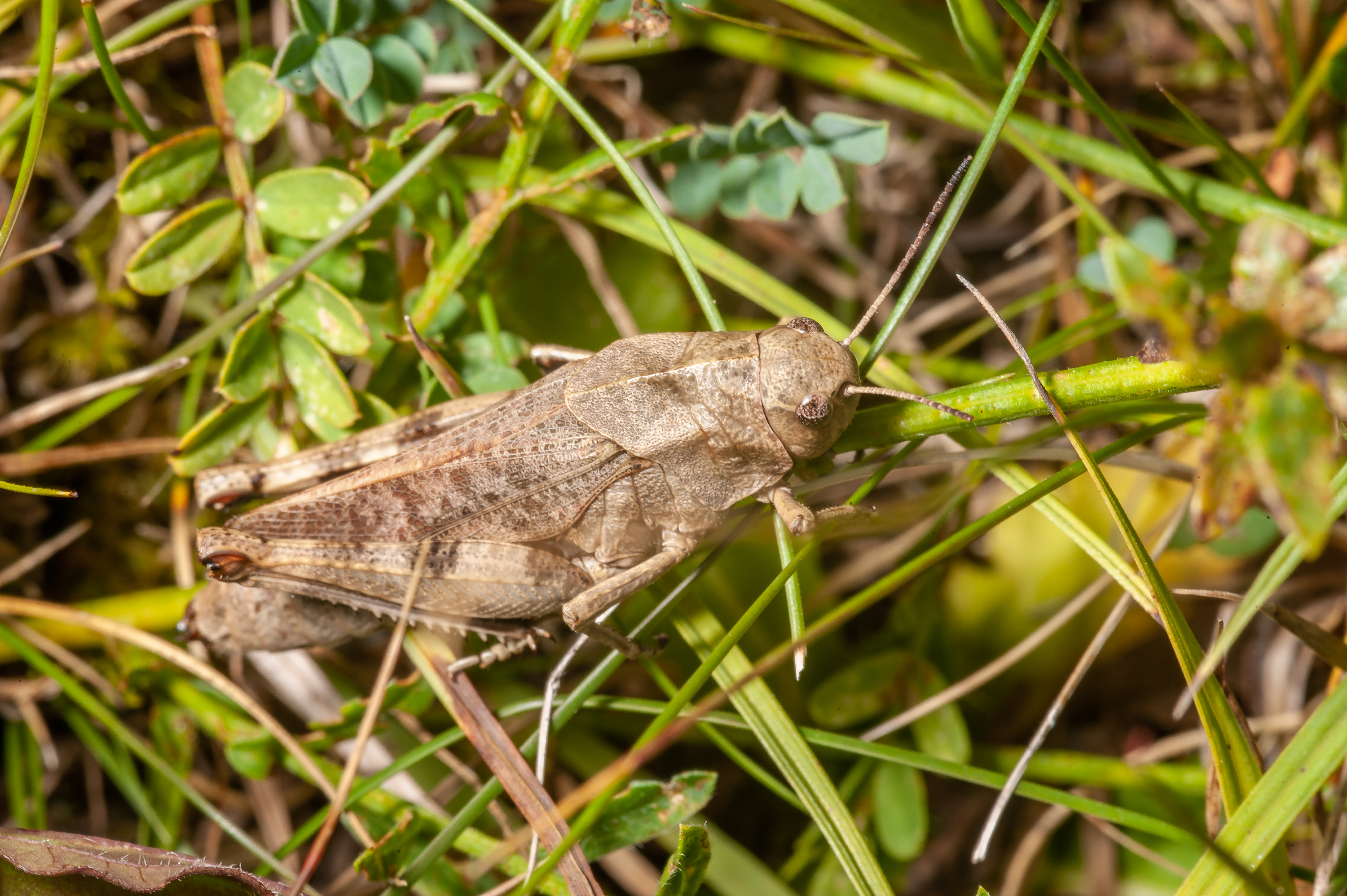 Rotflügelige Schnarrschrecke (Psophus stridulus), f. Wacholderheide im NSG Kornberg bei Gruibingen, Baden-Württemberg. Dank an die Mitglieder von Wikipedia:RBIO/B für die Bestimmung.